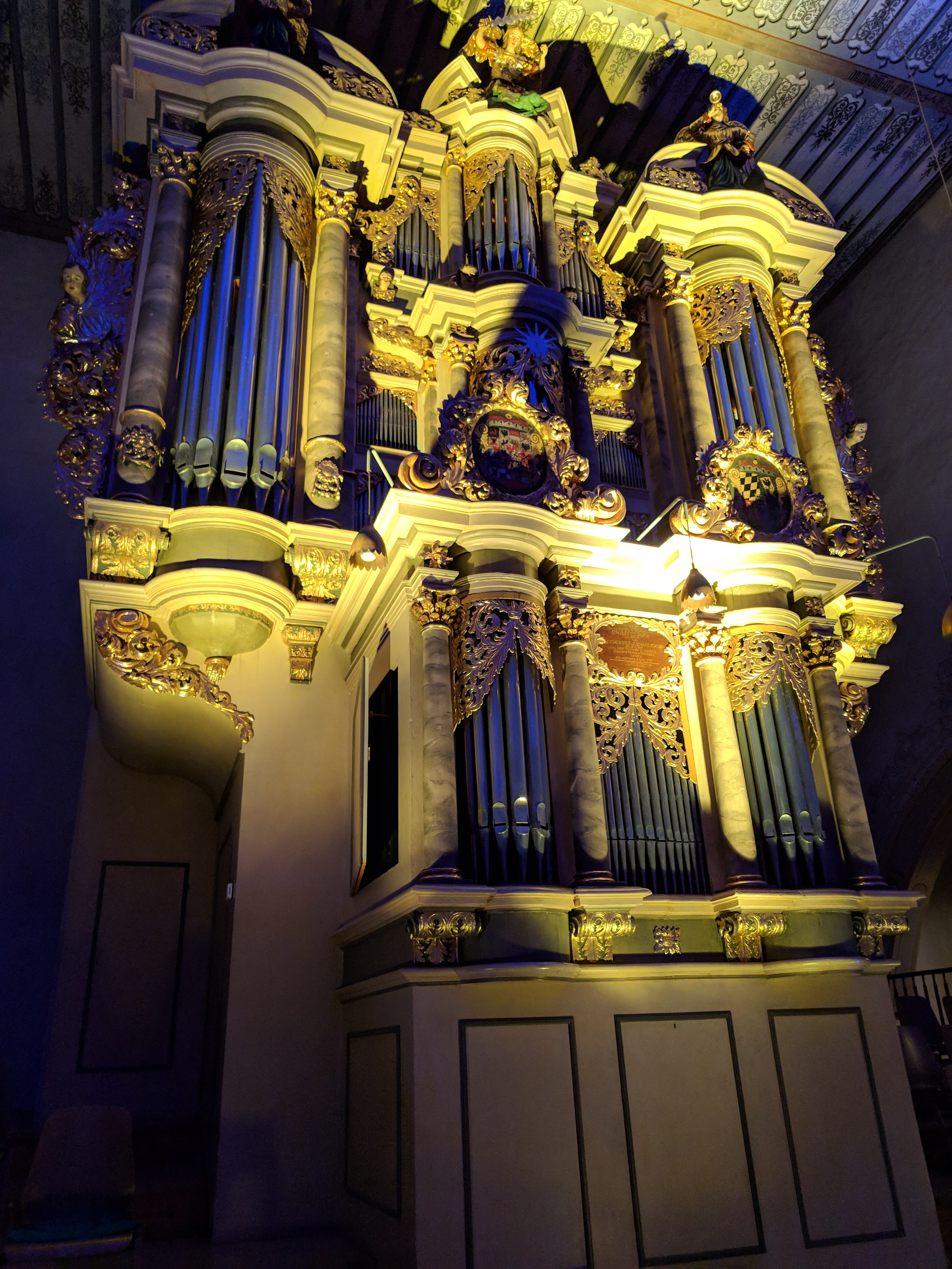 Frontansicht der Orgel von Johann Georg Allgeyer d. Ä. der Johanneskirche zu Crailsheim.